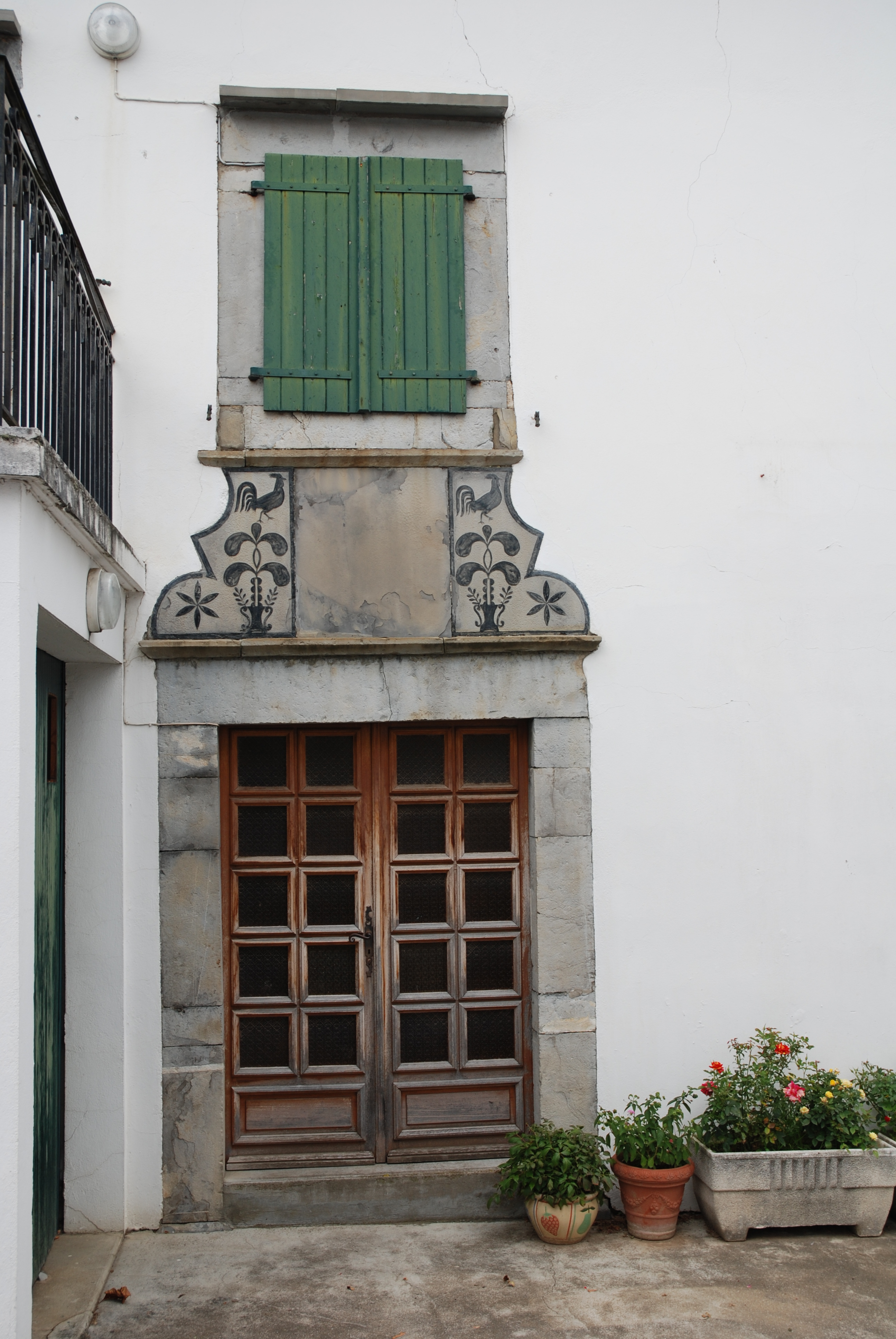 Iholdy, porte au linteau sculpté